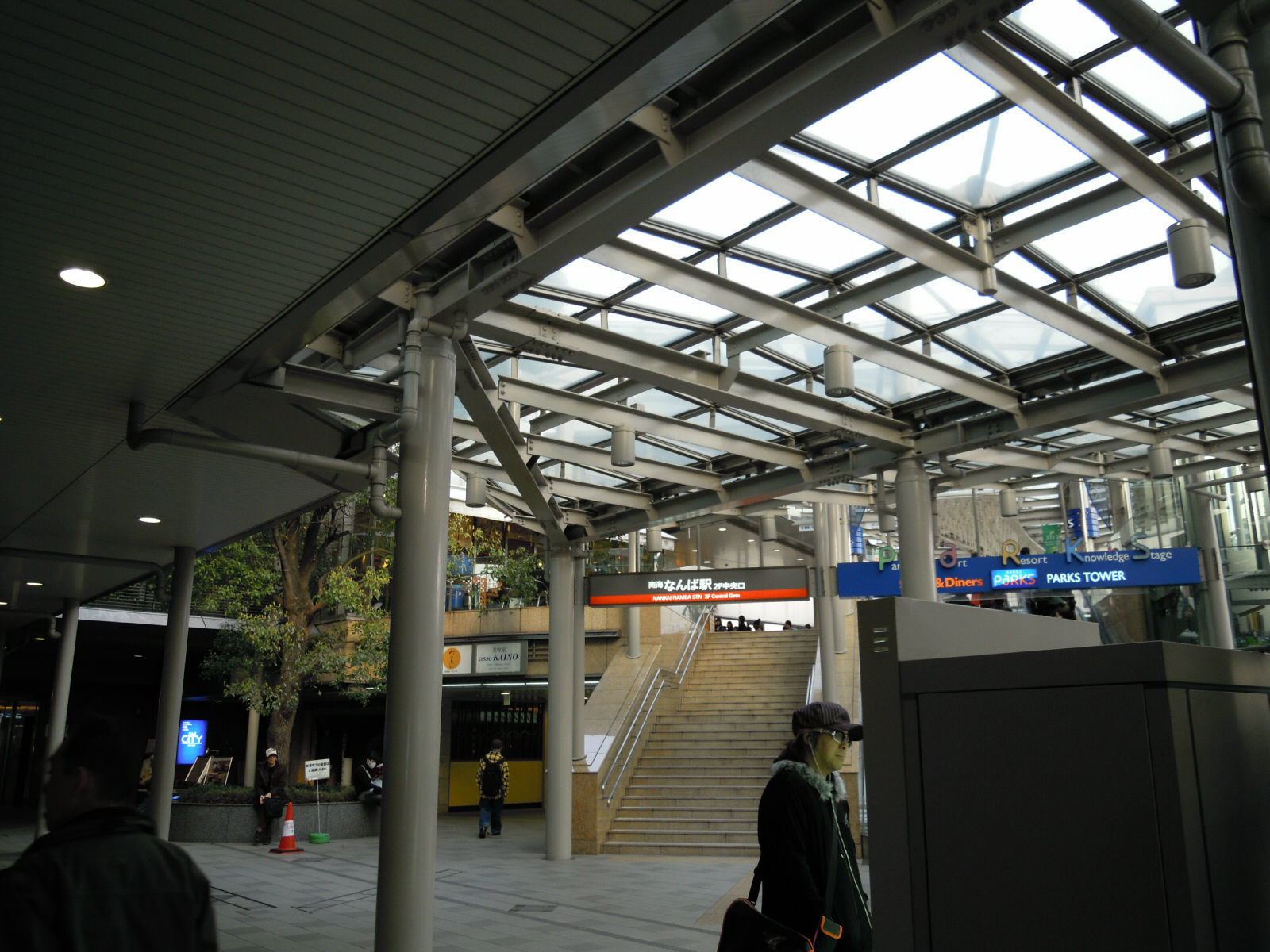 Nankai Nanba station